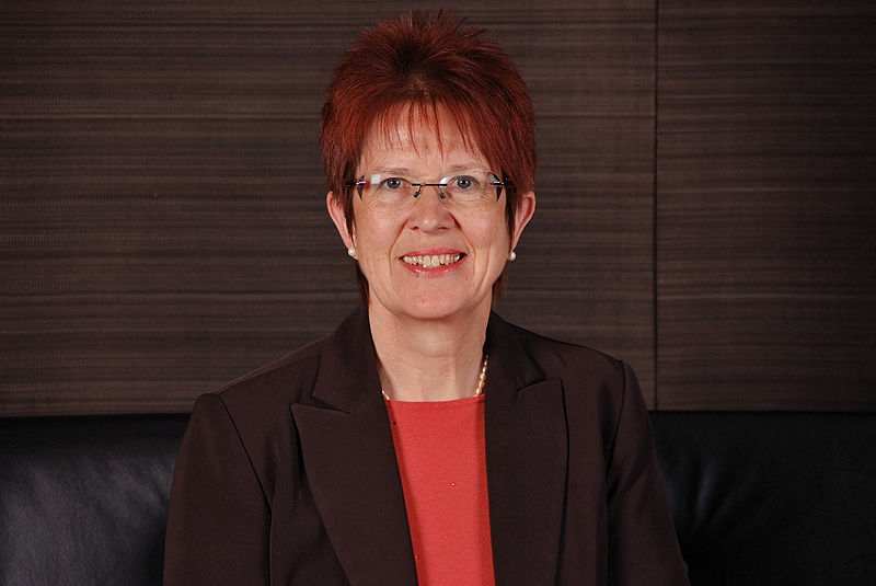 Dörthe Weddige-Degenhard, Landtagsabgeordnete Niedersachsen, 16. Wahlperiode (Fotoprojekt Landtagsabgeordnete Niedersachsen am 24. und 25. November 2009)